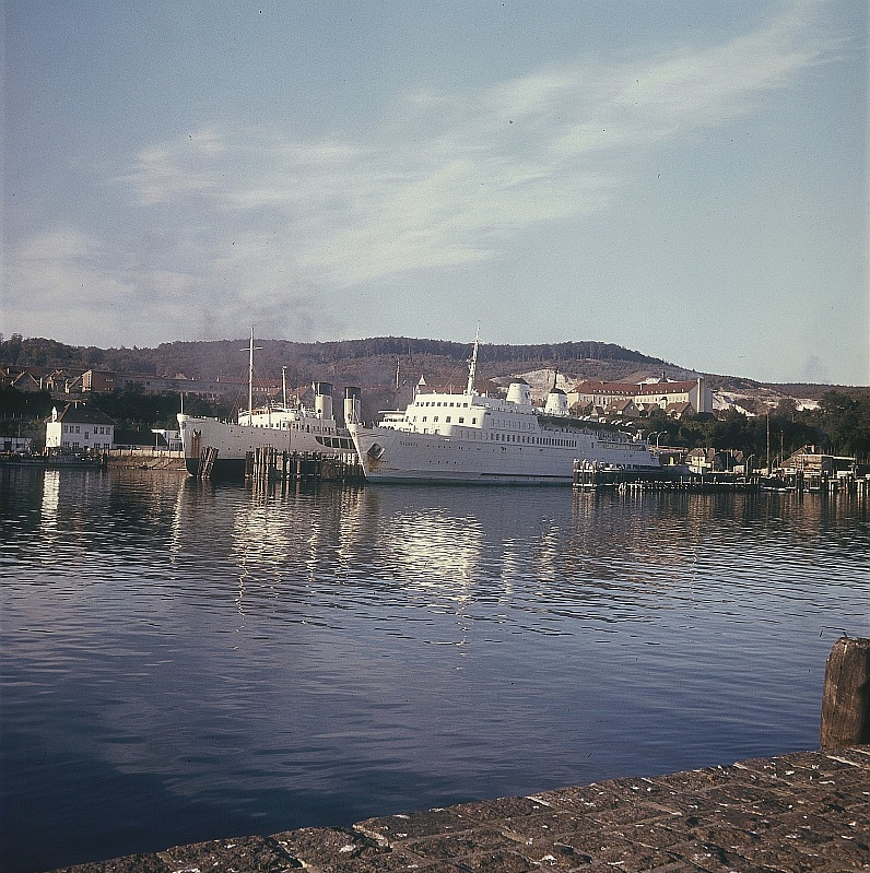 Original image description from the Deutsche Fotothek Saßnitz. Eisenbahnfährschiff "Saßnitz" im Fährhafen